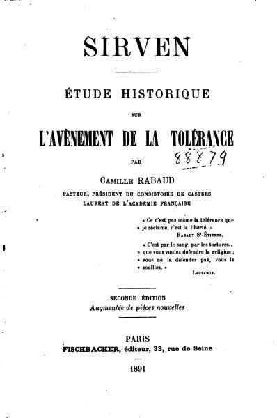 Sirven Camille Rabaud